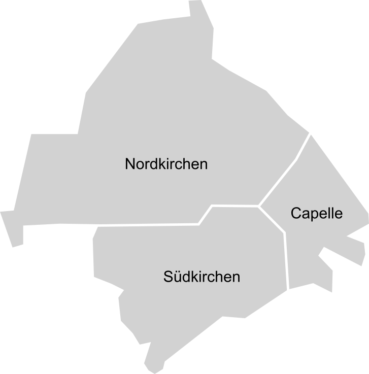 Ortsteilkarte von Nordkirchen